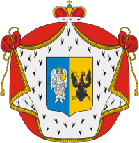 Герб рода князей Борятинских